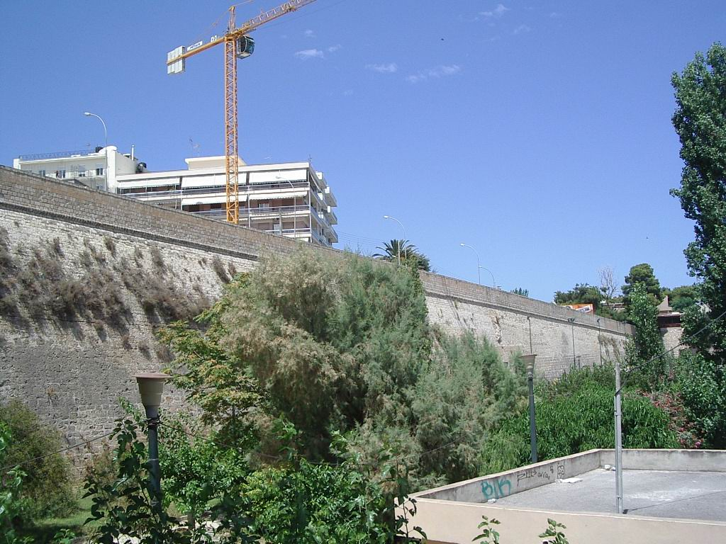 Gran muralla veneciana a Heràkleion, foto feta per J. Ollé l'agost del 2005